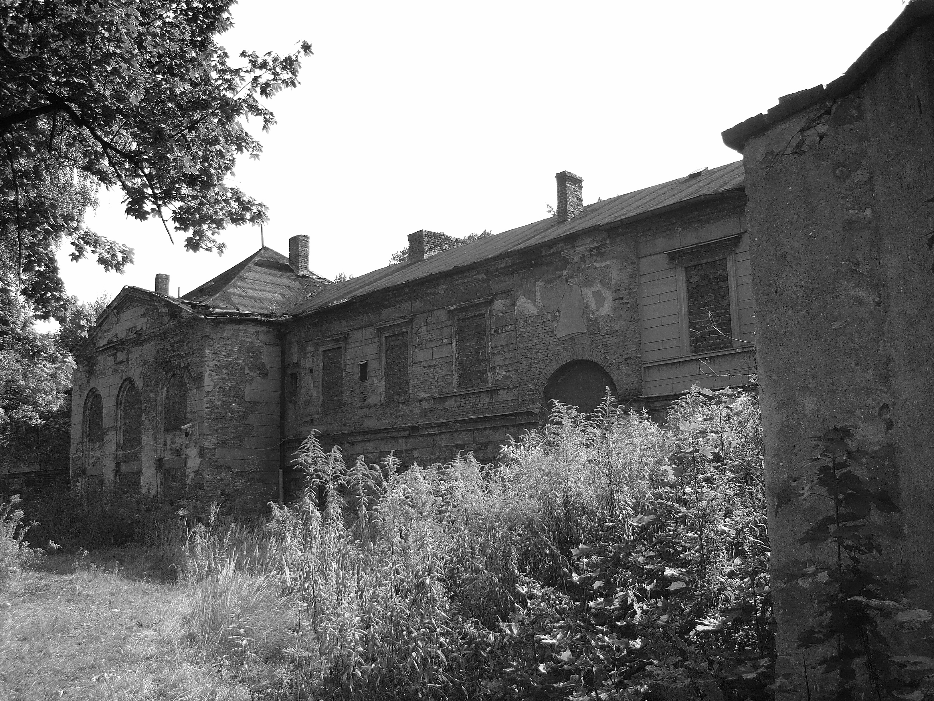 Zrujnowany pałac Donnersmarcków w centrum Siemianowic Śląskich.